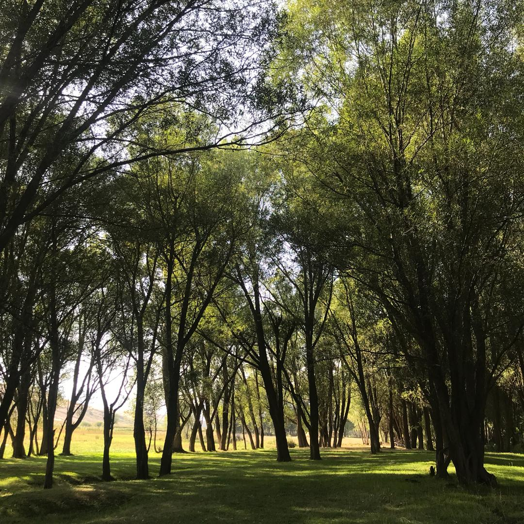 تپه قراول تپه سی